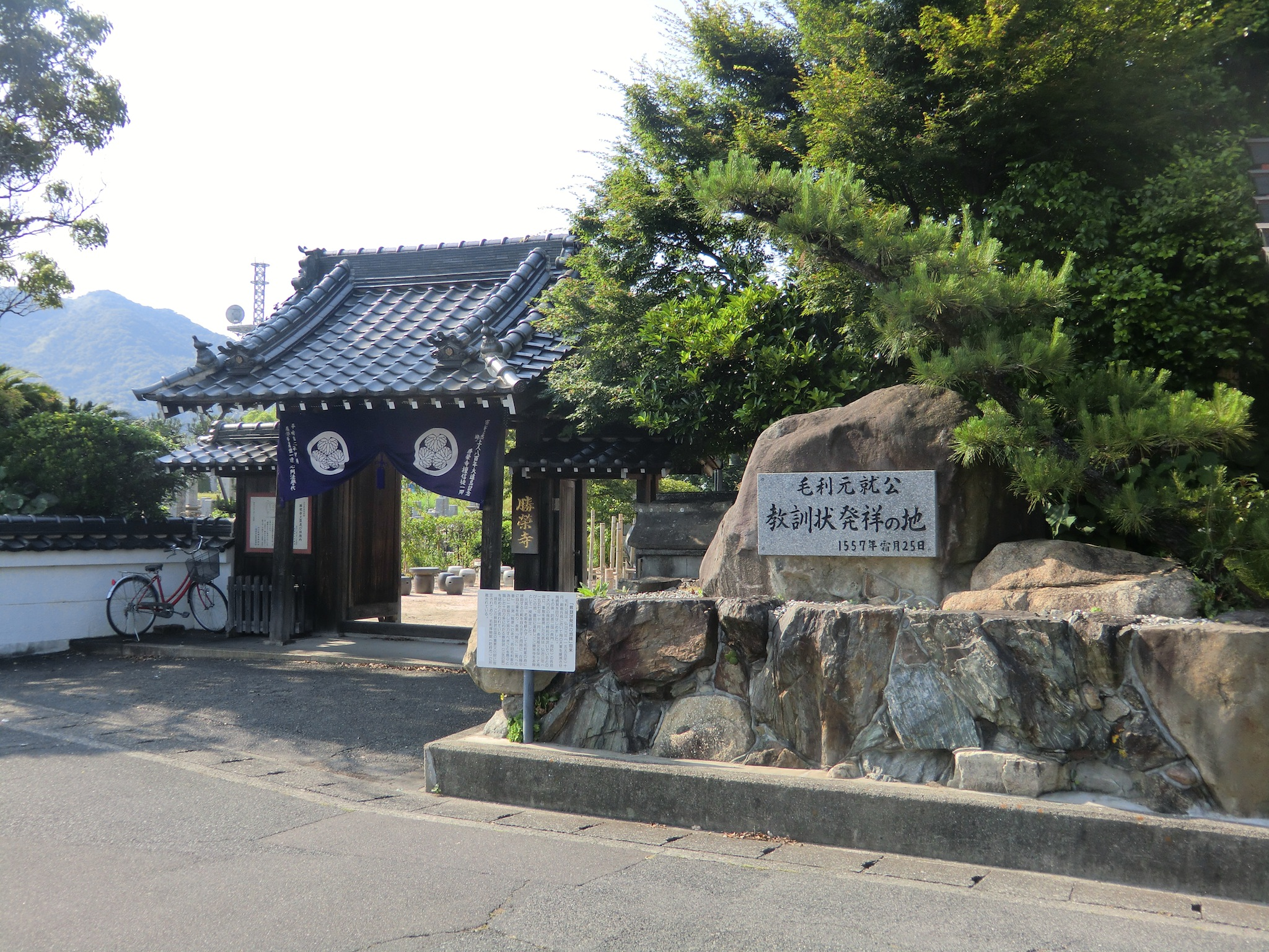 勝栄寺と毛利元就教訓状発祥地の碑（山口県周南市）